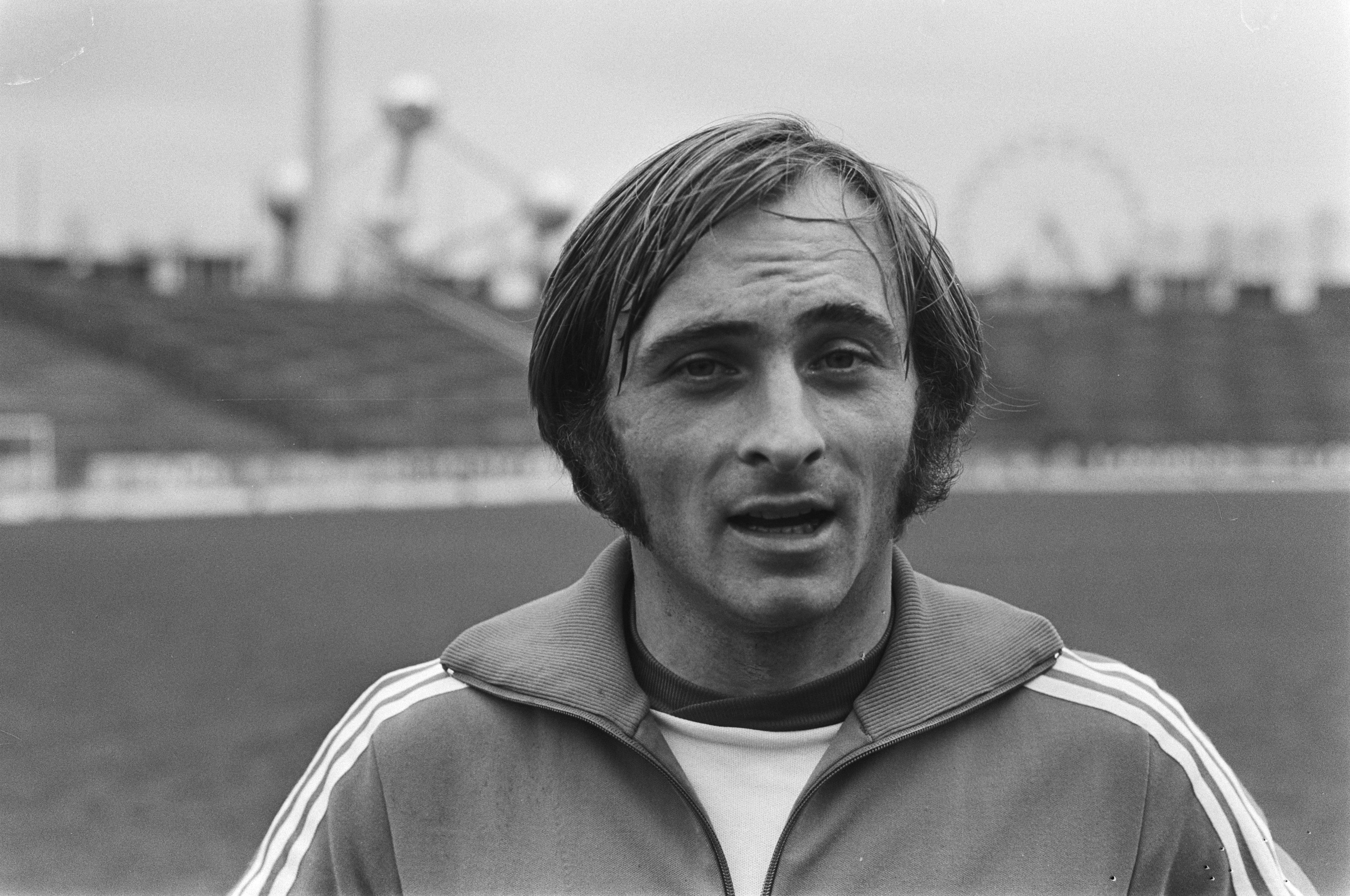 Collectie / Archief : Fotocollectie Anefo Reportage / Serie : Training Belgisch nationaal elftal in Brussel Beschrijving : Van Gool Datum : 23 maart 1977 Locatie : België, Brussel Trefwoorden : portretten, voetballers Persoonsnaam : Gool, Roger van Fotograaf : Peters, Hans / Anefo Auteursrechthebbende : Nationaal Archief Materiaalsoort : Negatief (zwart/wit) Nummer archiefinventaris : bekijk toegang 2.24.01.05 Bestanddeelnummer : 929-0884